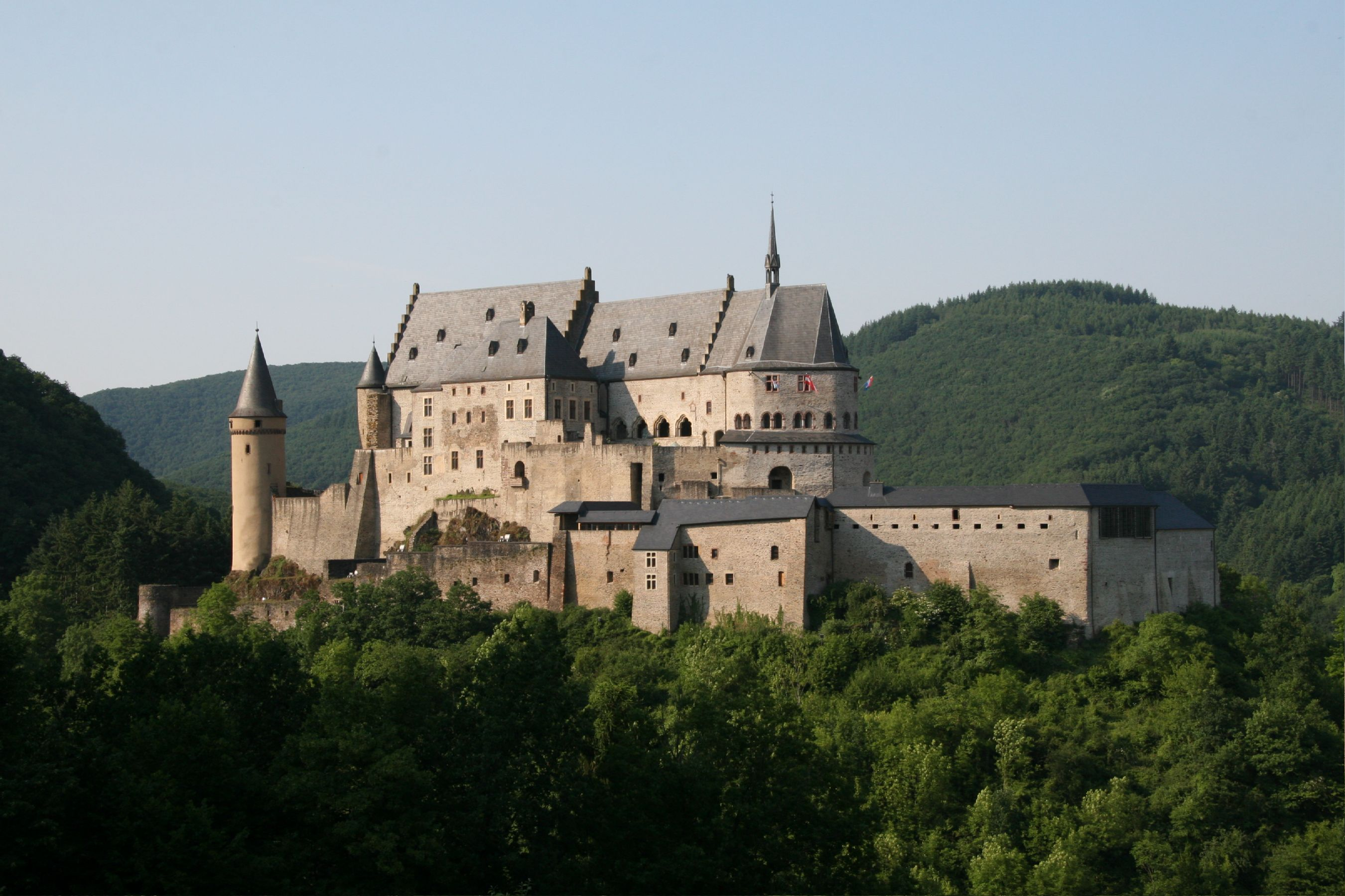 D'Buerg Veianen